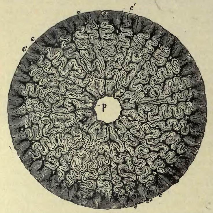 Зуб мастодонзавра на поперечном срезе